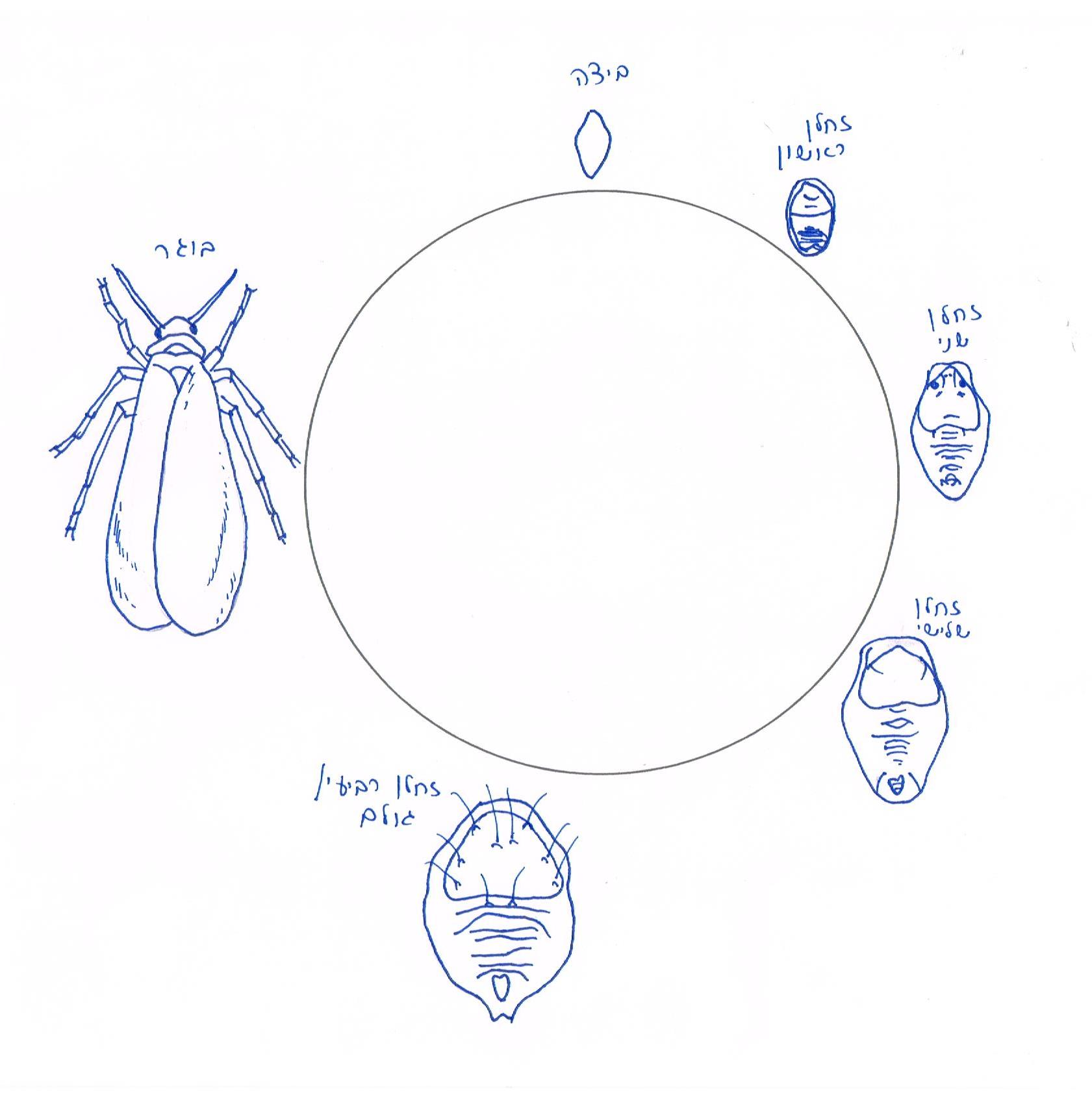 מחזור חיים כנימת עש הטבק